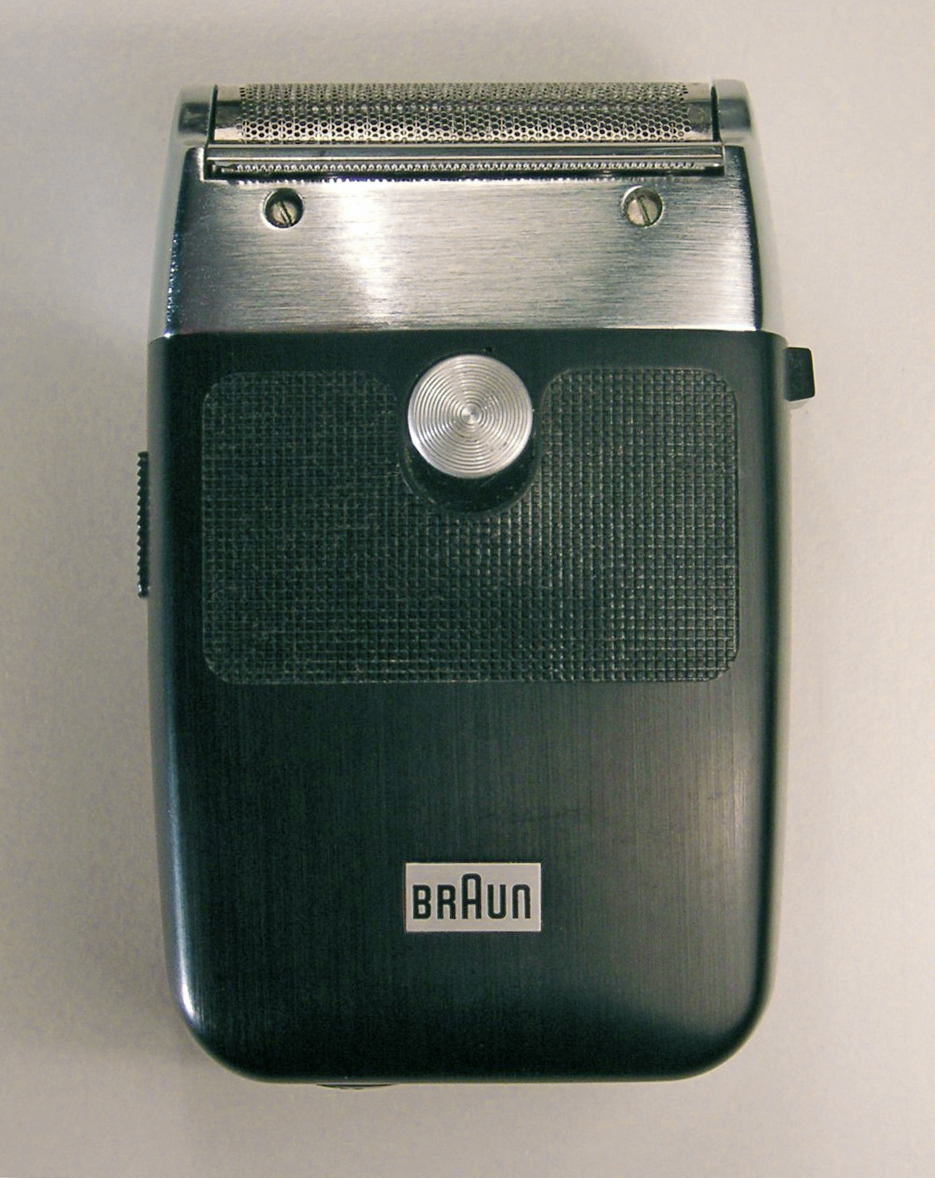 Braun Rasierapparat Sixtant